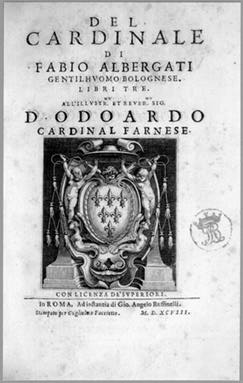 Del Cardinale, di Fabio Albergati, Bologna 1589; Roma 1598 e 1599